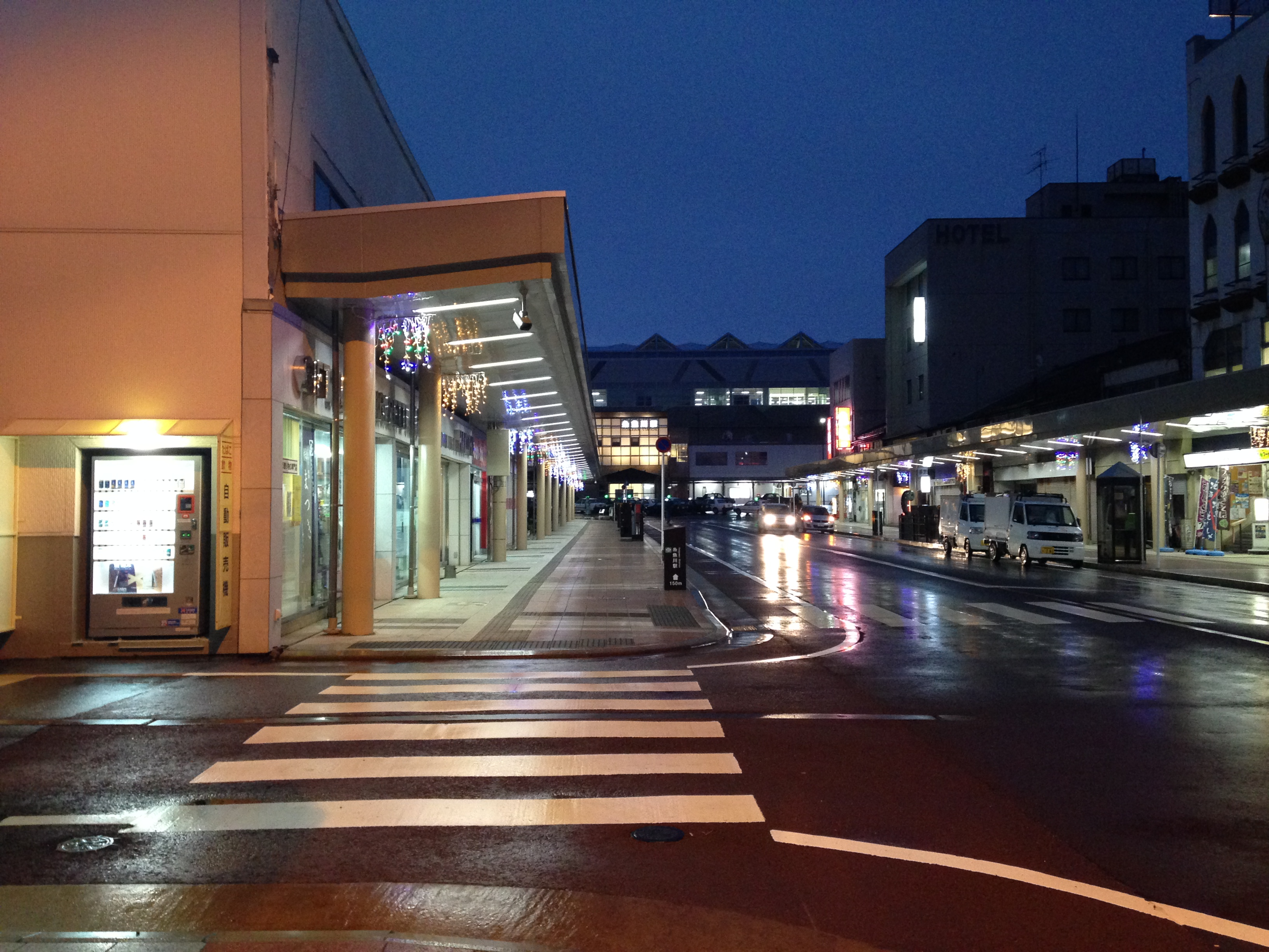 夜の糸魚川駅日本海口前の商店街。奥に糸魚川駅が見える